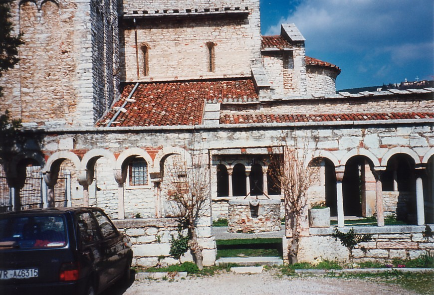 Chiesa di San Giorgio nell'omonima frazione del comune si Sant'Ambrogio di Valpolicella, Verona. Chiostro.